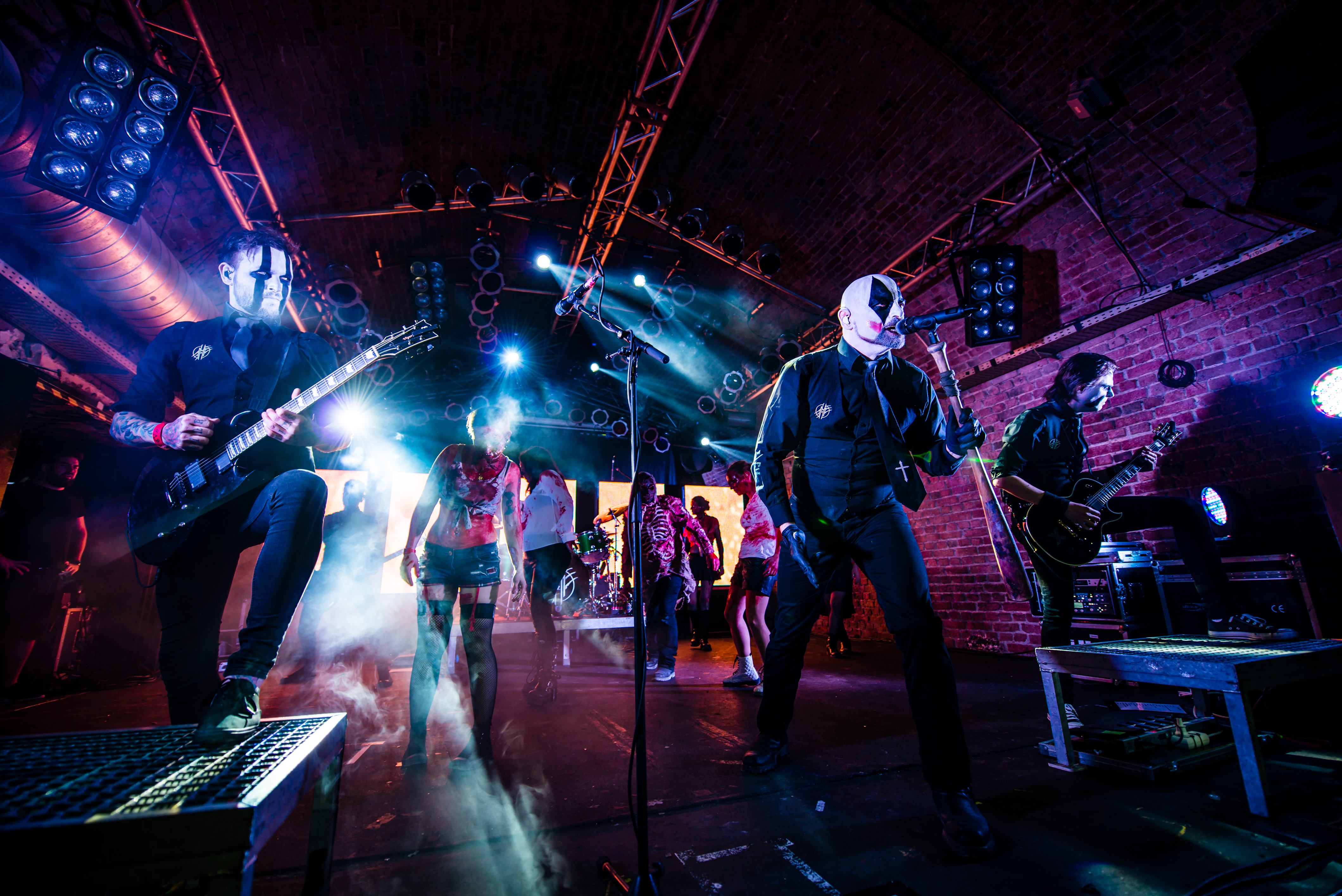 'Megaherz Erdwärts Tour - Bochum Matrix'